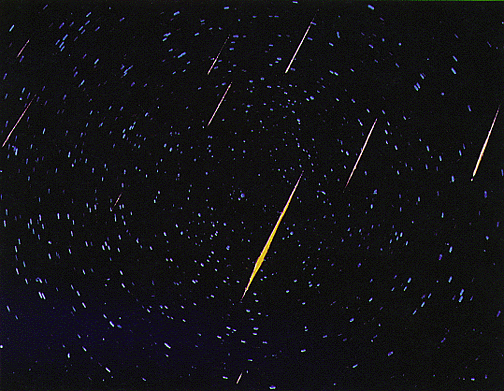 Леоніди